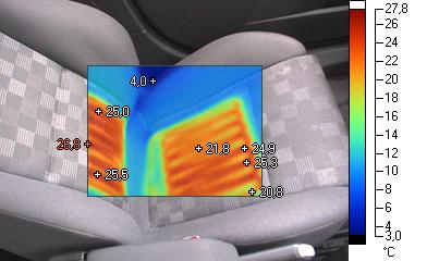 Bild eines Autositzes mit einer zwischen Sitzbezug und Polsterung nachgerüsteten Sitzheizung mit Heizdrähten